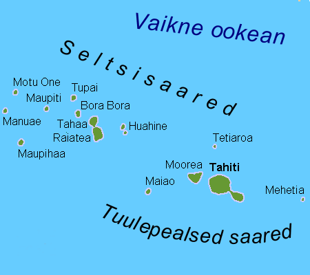 Tuulepealsed saared